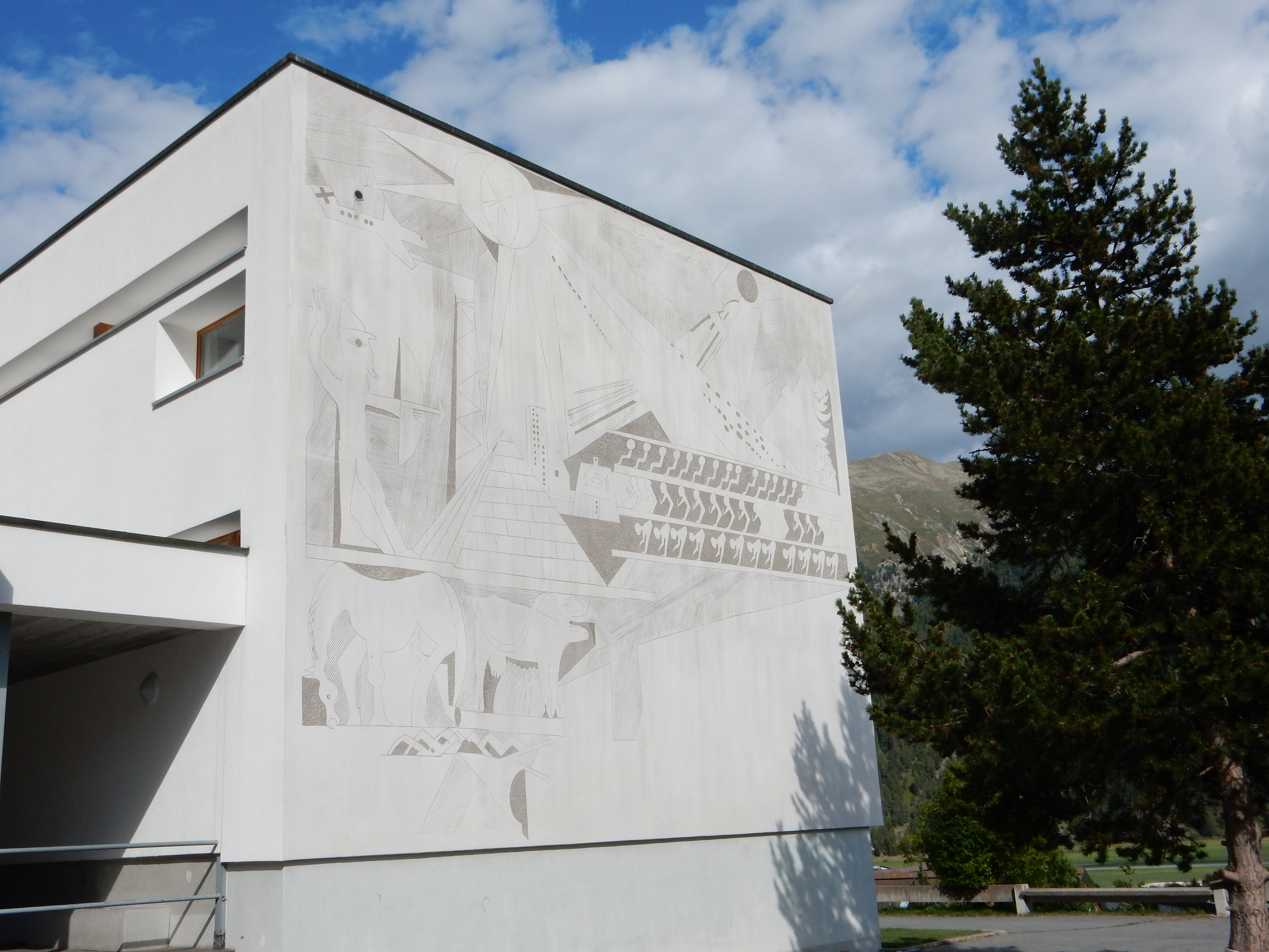 Werk von Giuliano Pedretti: "Grosses Weltbild", romanisch: "Cum pumpa majestusa", 1967, Sgraffito, Adresse: Neues Schulhaus (Südwestfassade), Puoz 2, Samedan GR, Schweiz. Quelle: Kurzfilm zu diesem Werk